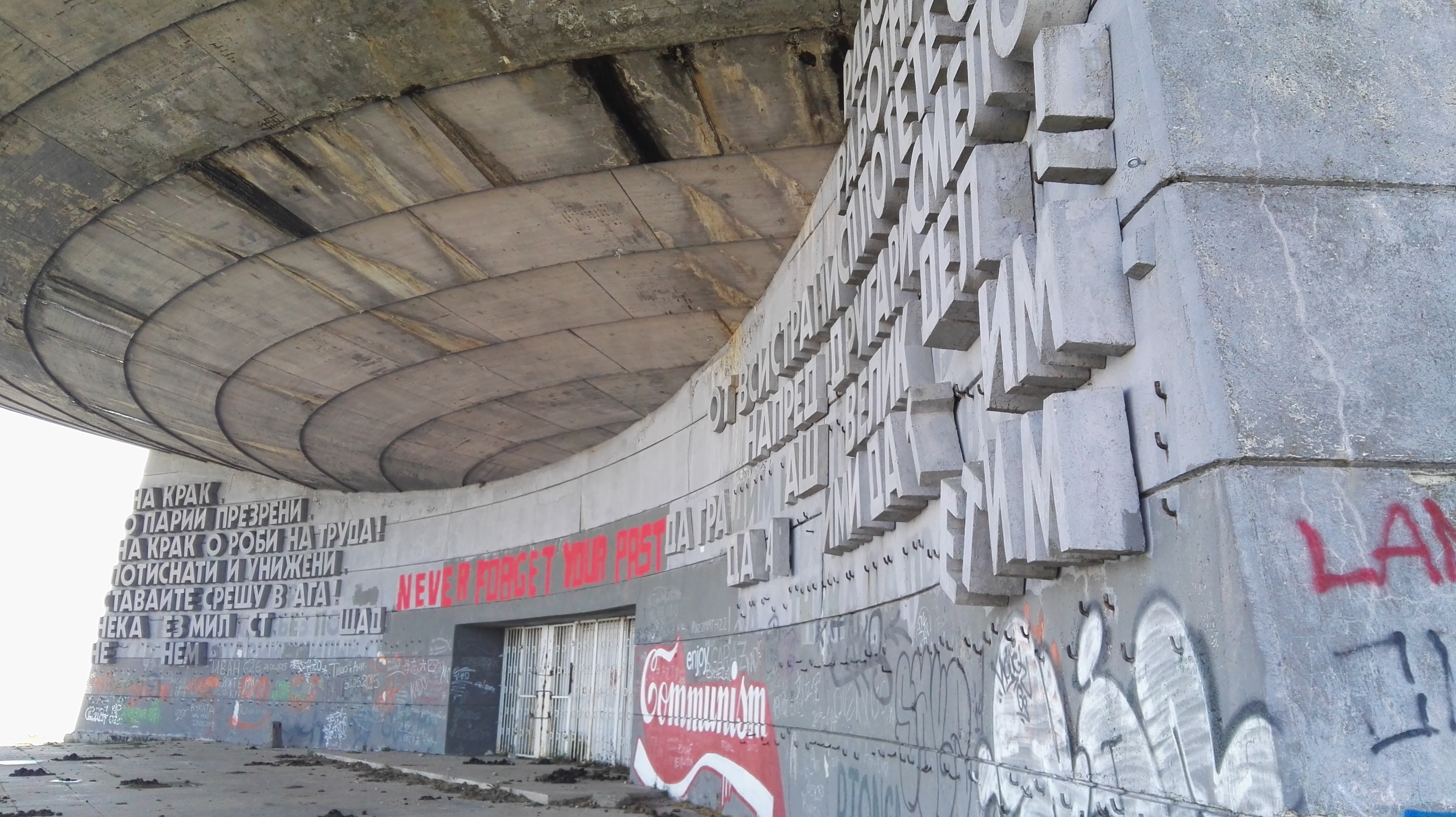 Национален парк-музей "Шипка-Бузлуджа"